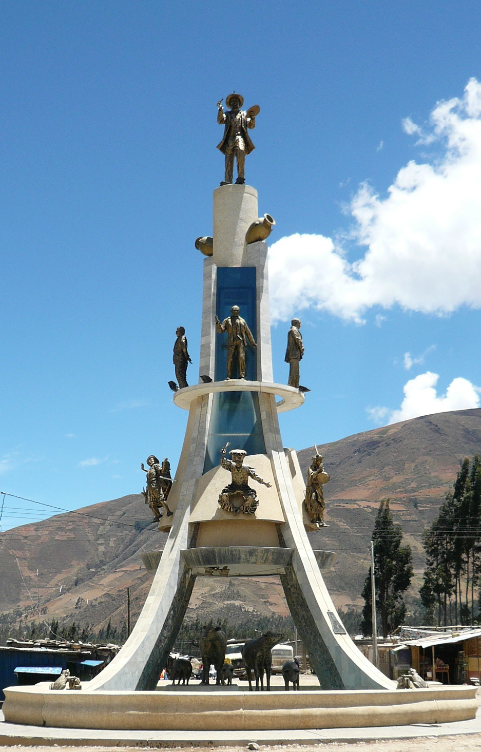 Ovalo de Pampas, ubicado en la entrada a esta ciudad.